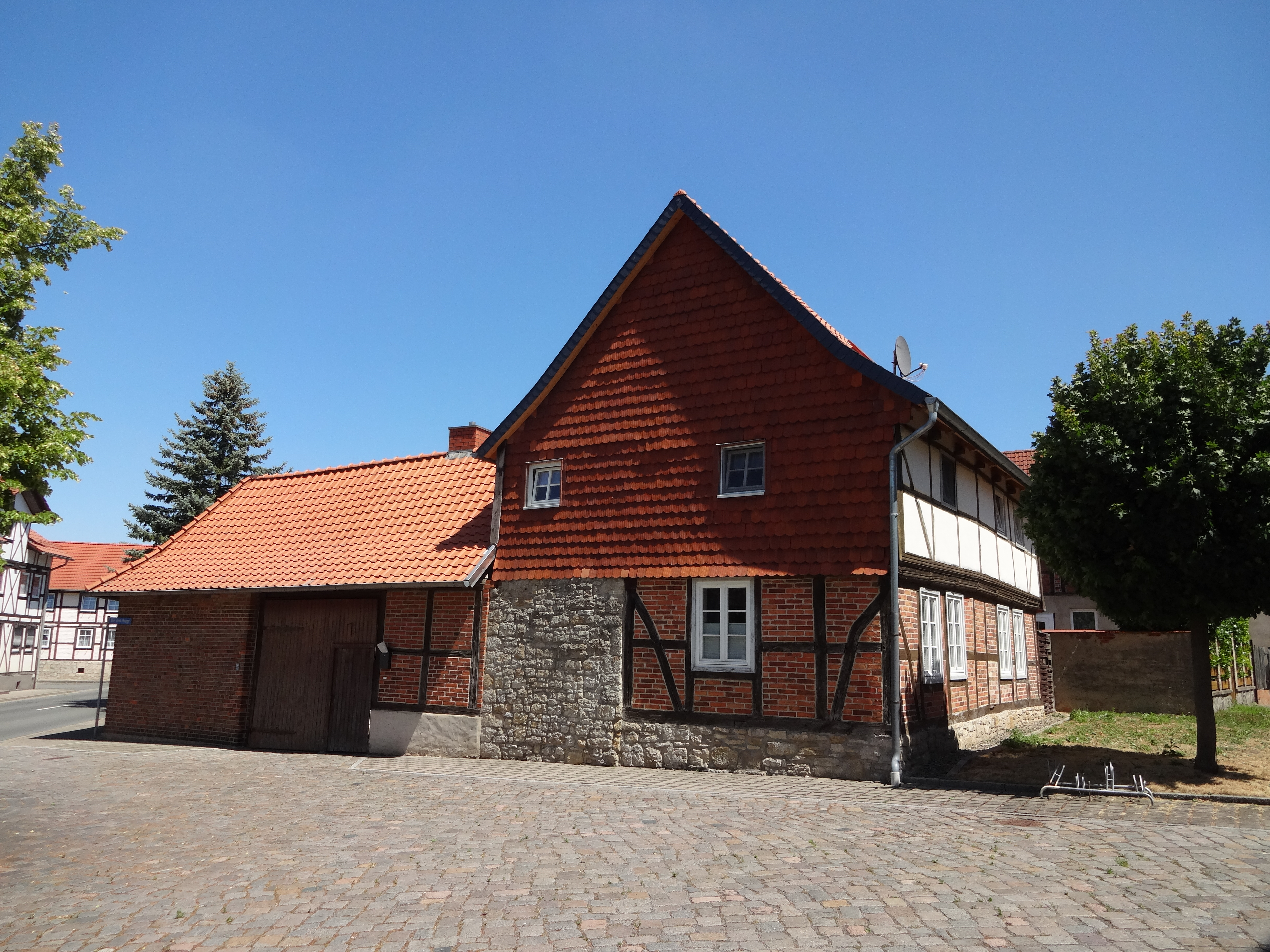 denkmalgeschützter ehemaliger Gasthof in der Straße Vor dem Kruge 1 in Dedeleben